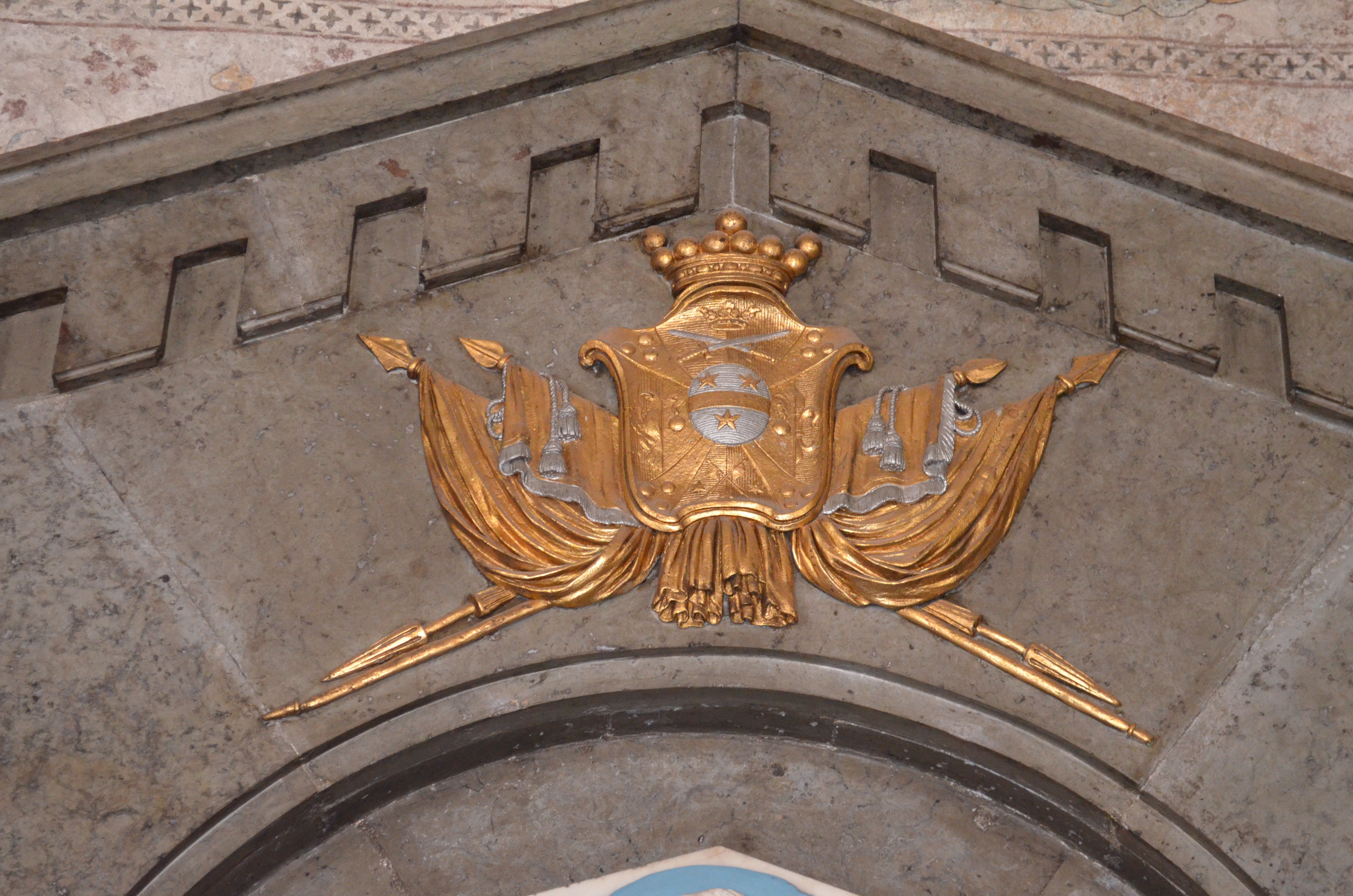 Detalj av Epitafium över Carl Wallesntierna (d 1796) i Almunge kyrka, Uppland